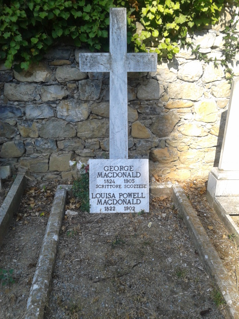 Tombe de George et Luisa McDonald